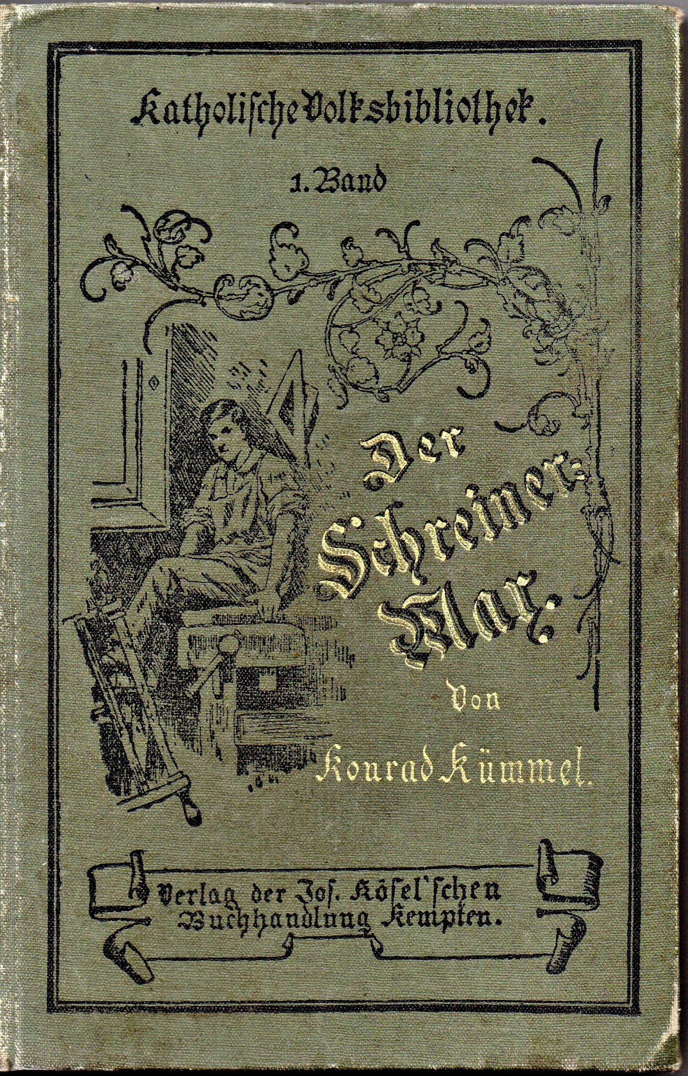 Buchcover von Konrad Kümmel, 1899